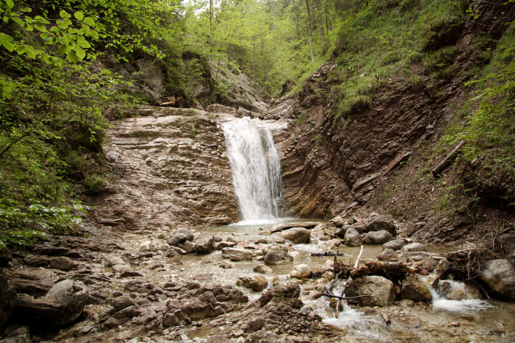 Unterammergau, Schleifmühlenlaine in der Schleifmühlenklamm